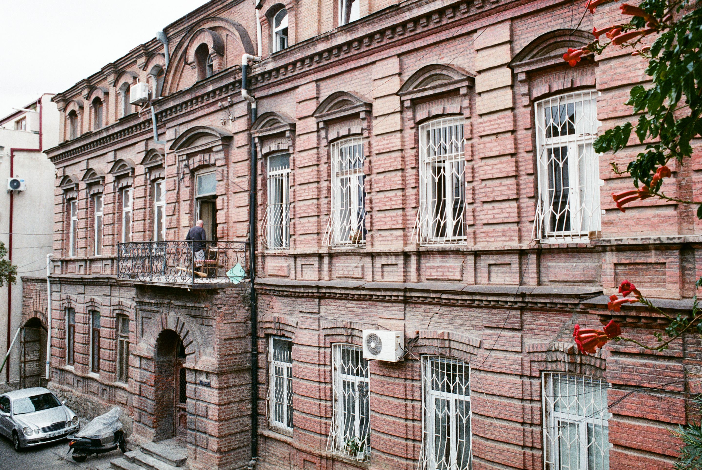 საცხოვრებელი სახლი